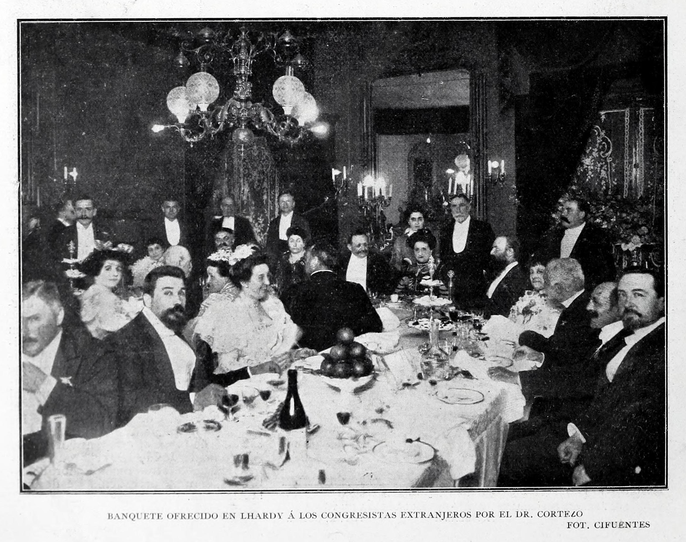 Banquete ofrecido en Lhardy á los congresistas extranjeros por el Dr. Cortezo. Fot. Cifuentes.